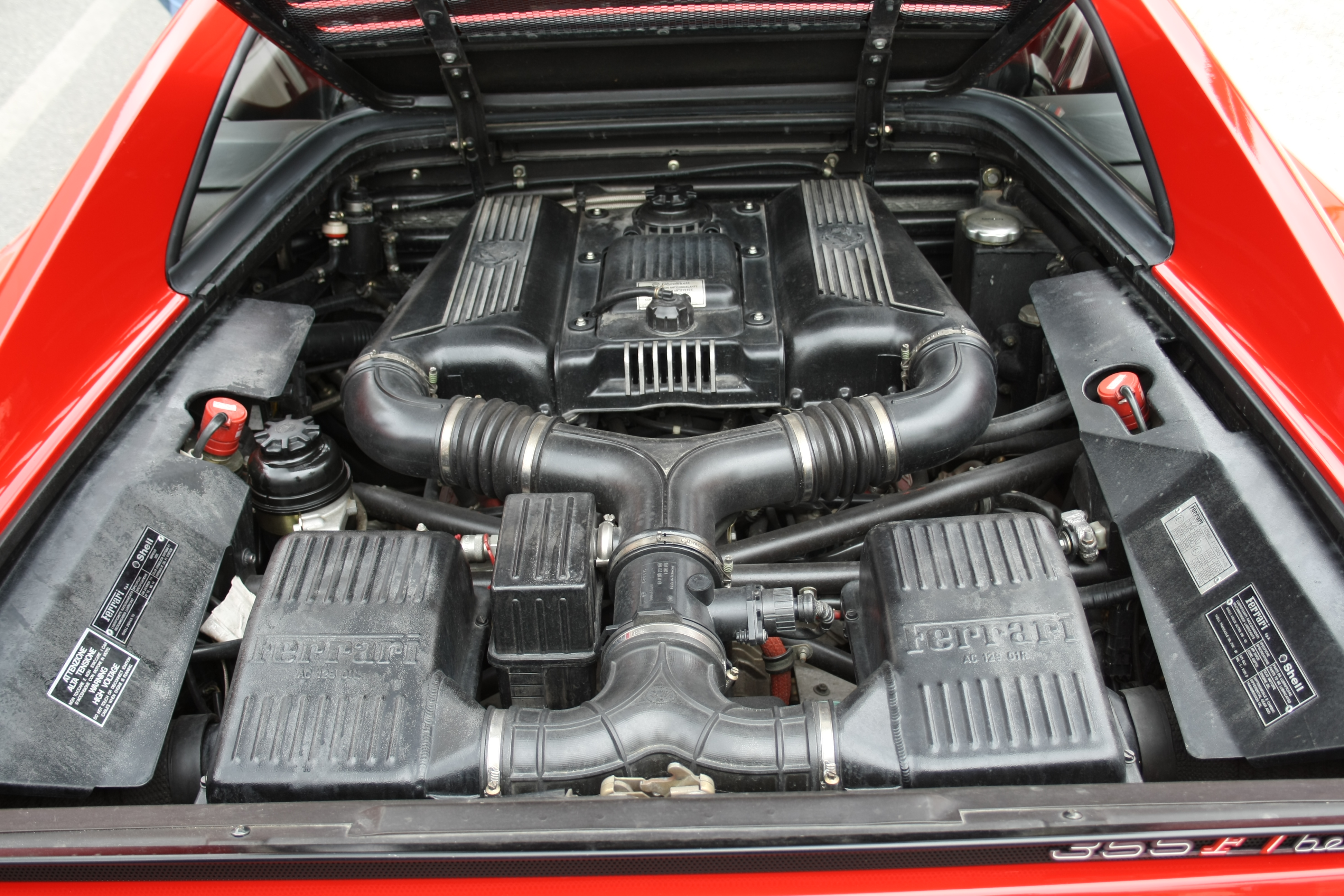 Il propulsore della Ferrari F355 Berlinetta.